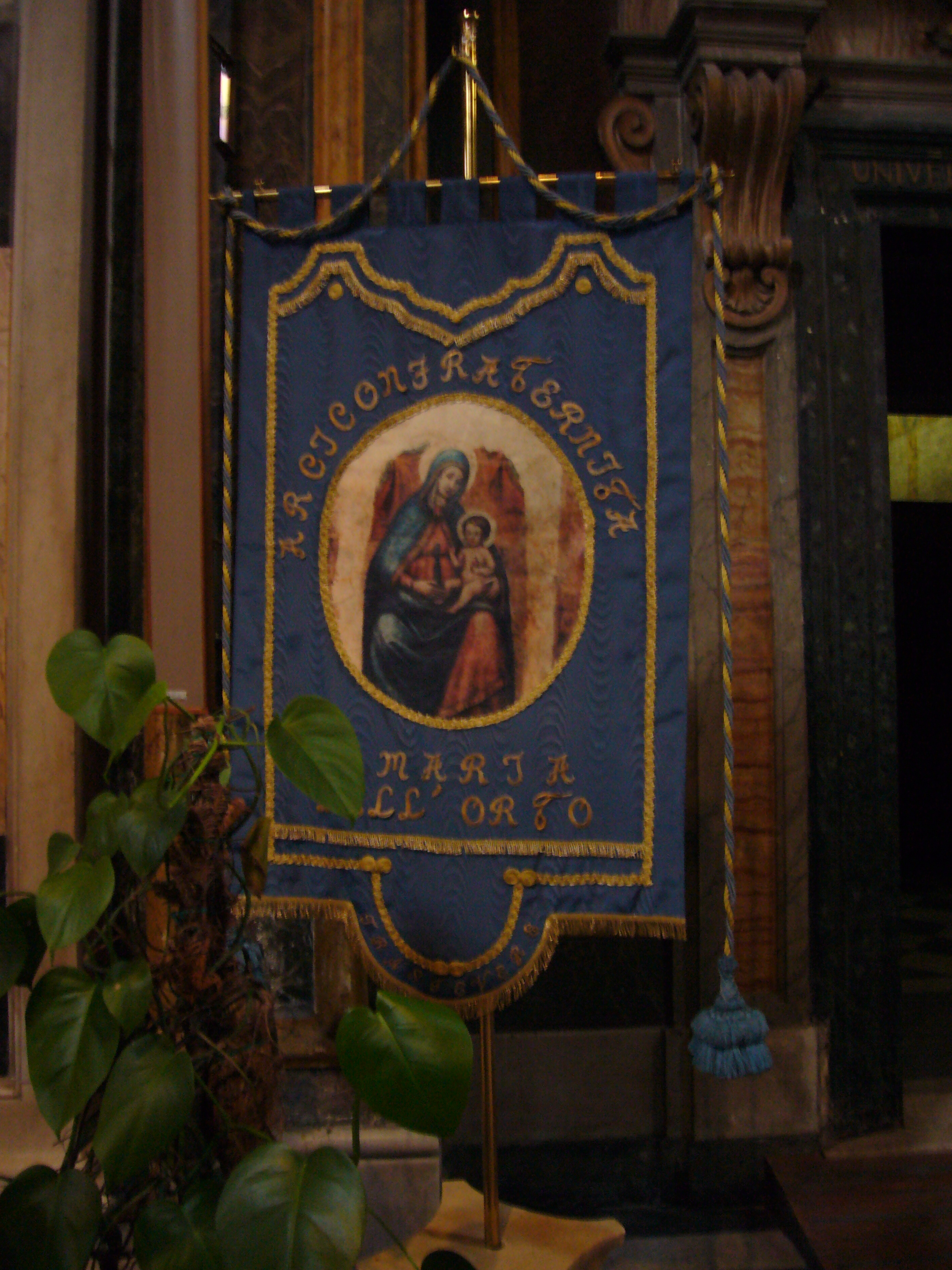 Roma, santa Maria dell'Orto: stendardo dell'Arciconfraternita